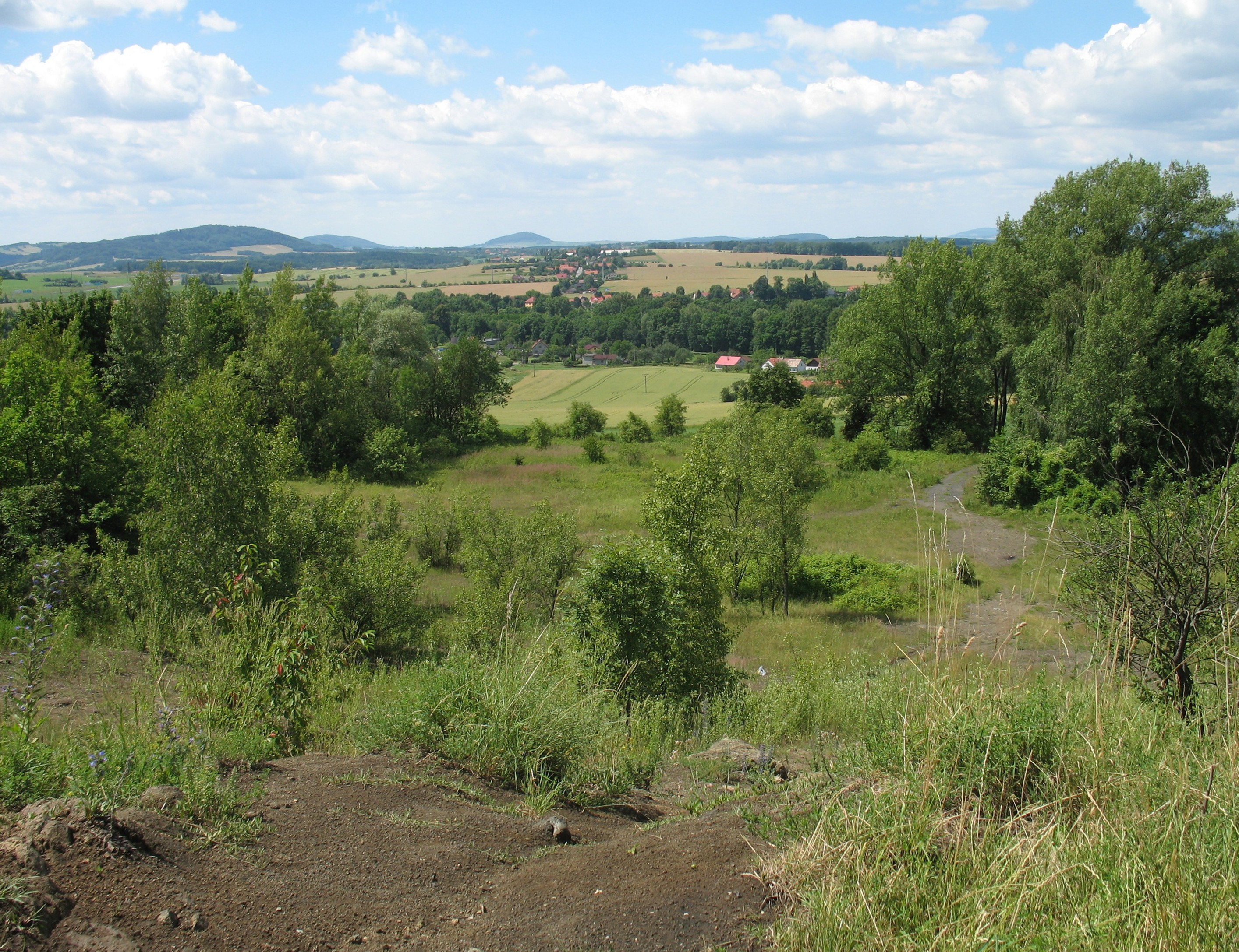 Pohled na Skotnici z vrcholu Hončovy hůrky